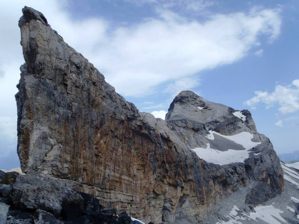 Casco de Marboré (Parque nacional de Ordesa y Monte perdido)